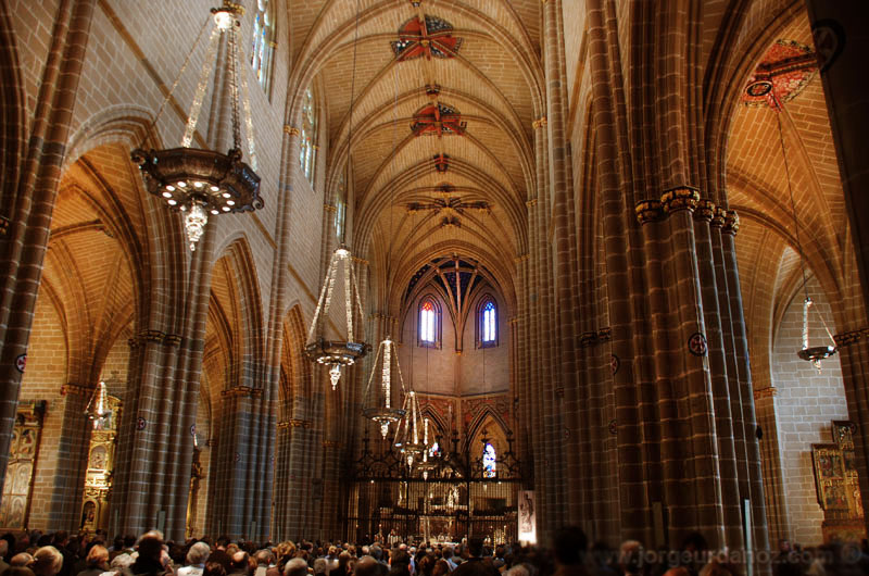 naves pamplona